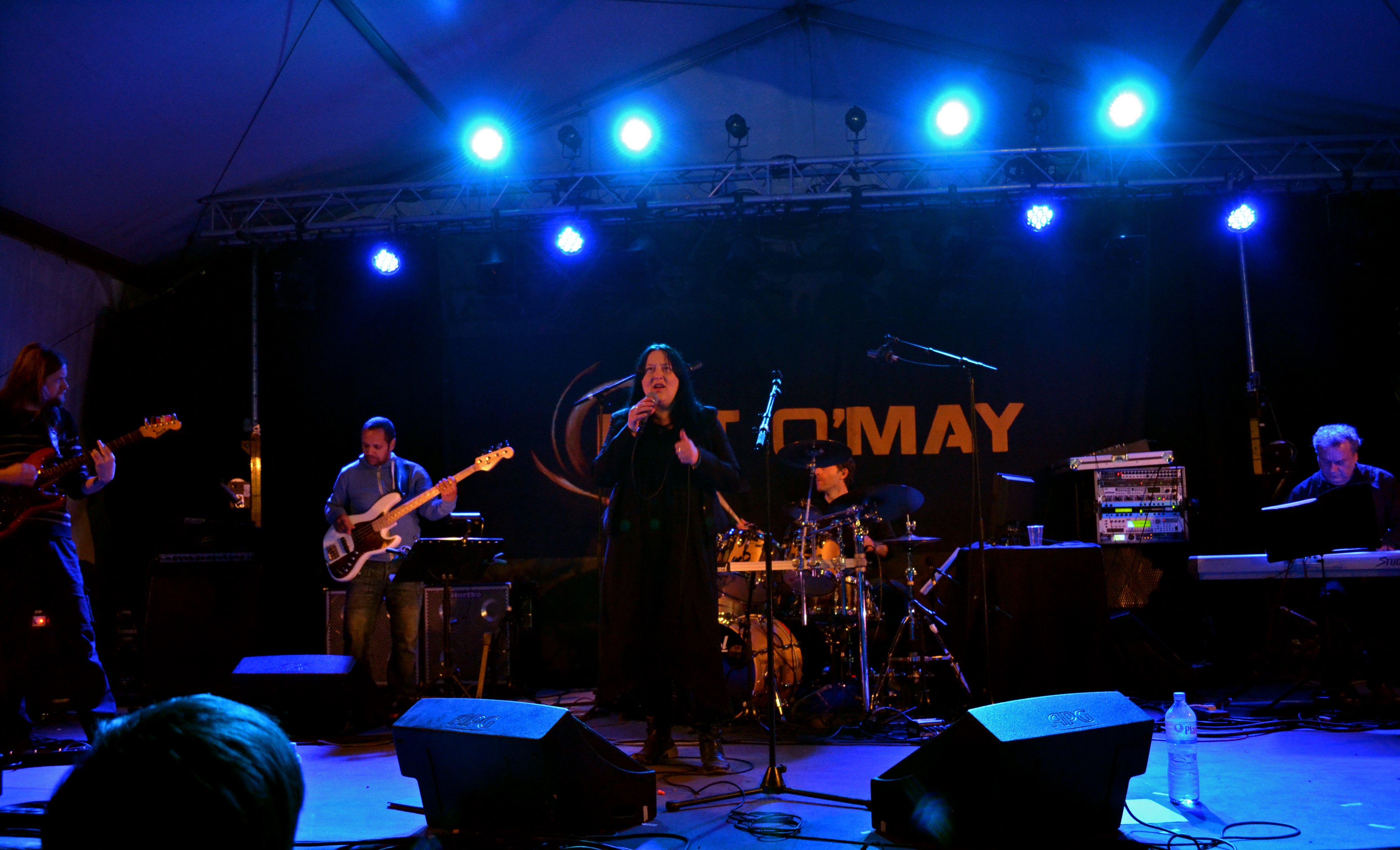 Concert du groupe Children in Paradise (rock celtique progressif) au Festy'Jeanne, festival des Légendes Celtiques, à Plouégat-Moysan le 4 mai 2013.